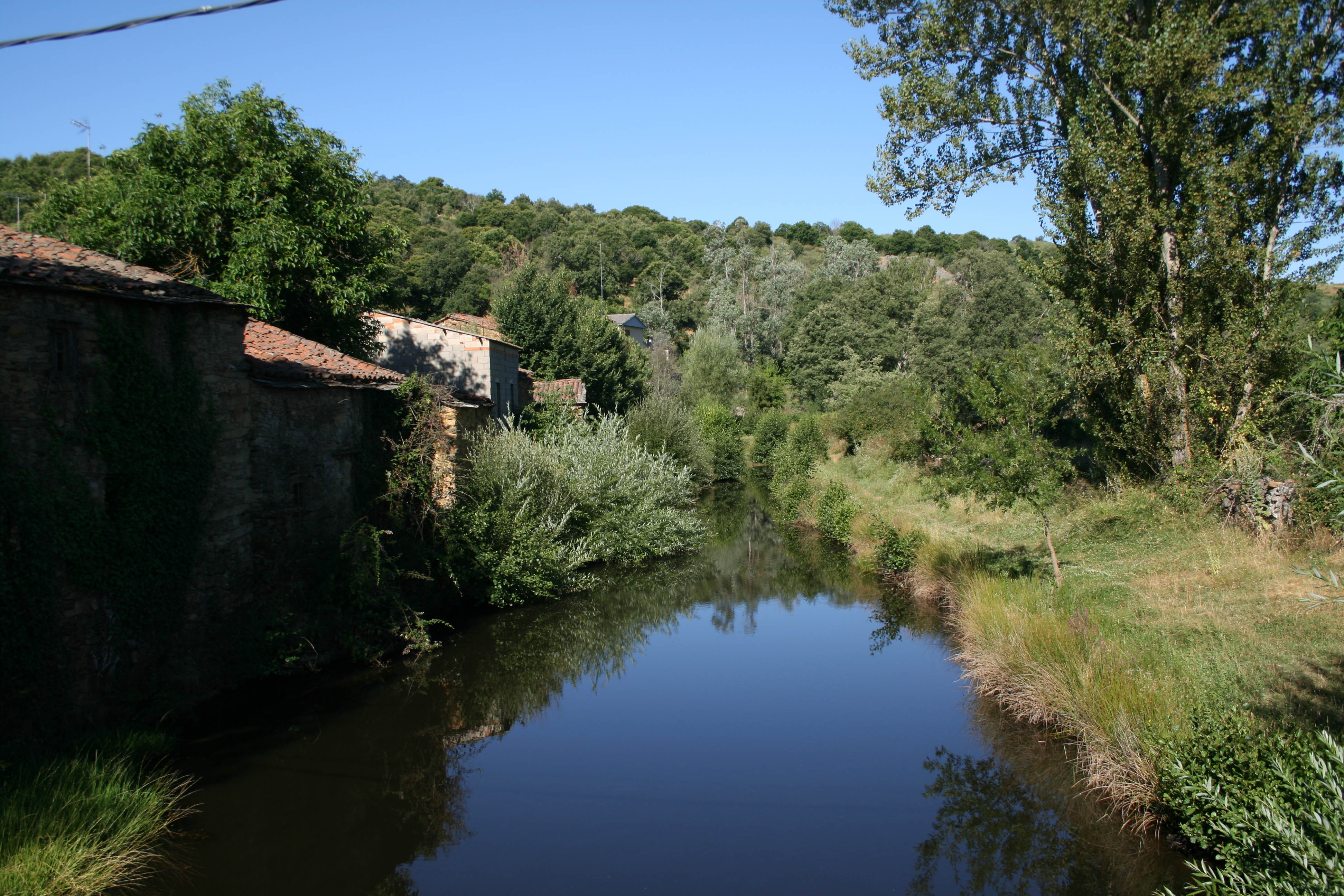 Imagen del río aliste vista desde el puente de arriba camino a Mahide.